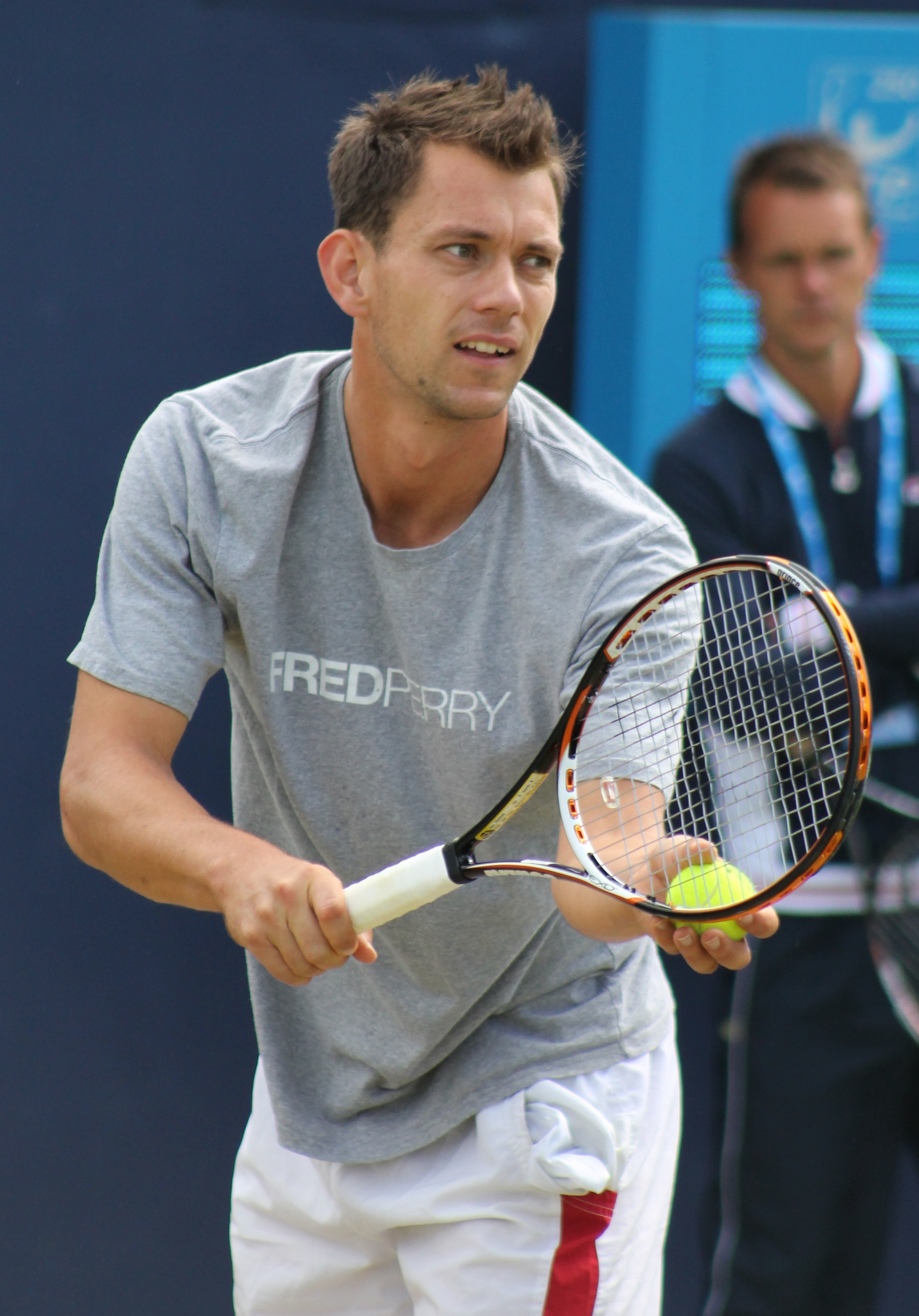 Nielsen QC13-004